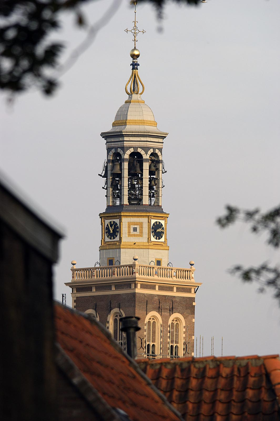 De nieuwe toren in Kampen, gebouwd tussen 1648 en 1664 als carillontoren, is pas gerestaureerd en staat tegenwoordig weer te glimmen in de zon. Niet enkel van de overzijde van de IJssel is deze toren fraai te zien, maar ook vanaf vele punten in en om de stad.